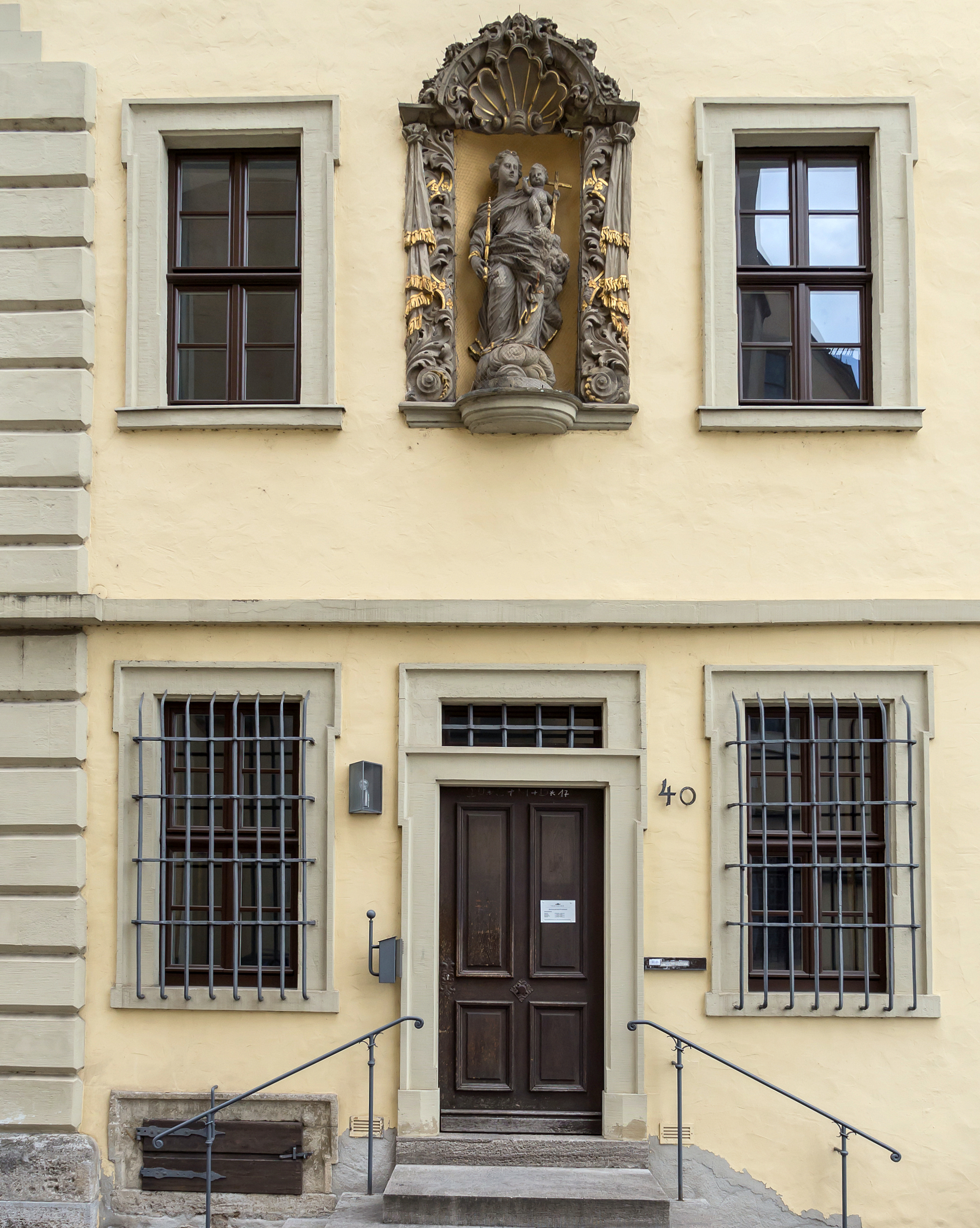 Würzburg Burkarderstraße 40 Katholisches Pfarrhaus St. Burkard , barock, frühes 18. Jahrhundert,Barocknische mit Madonna, Sandstein, 18. Jahrhundert I Akt.Nr. D-6-63-000-83Barocknische mit Madonna, Sandstein, 18. Jahrhundert